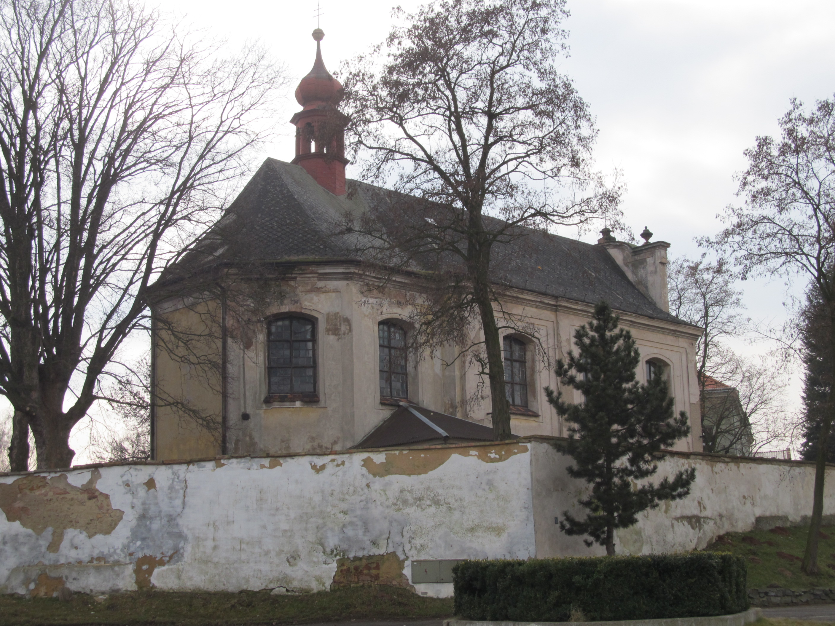 Vroutek - kostel svatého Jana Křtitele